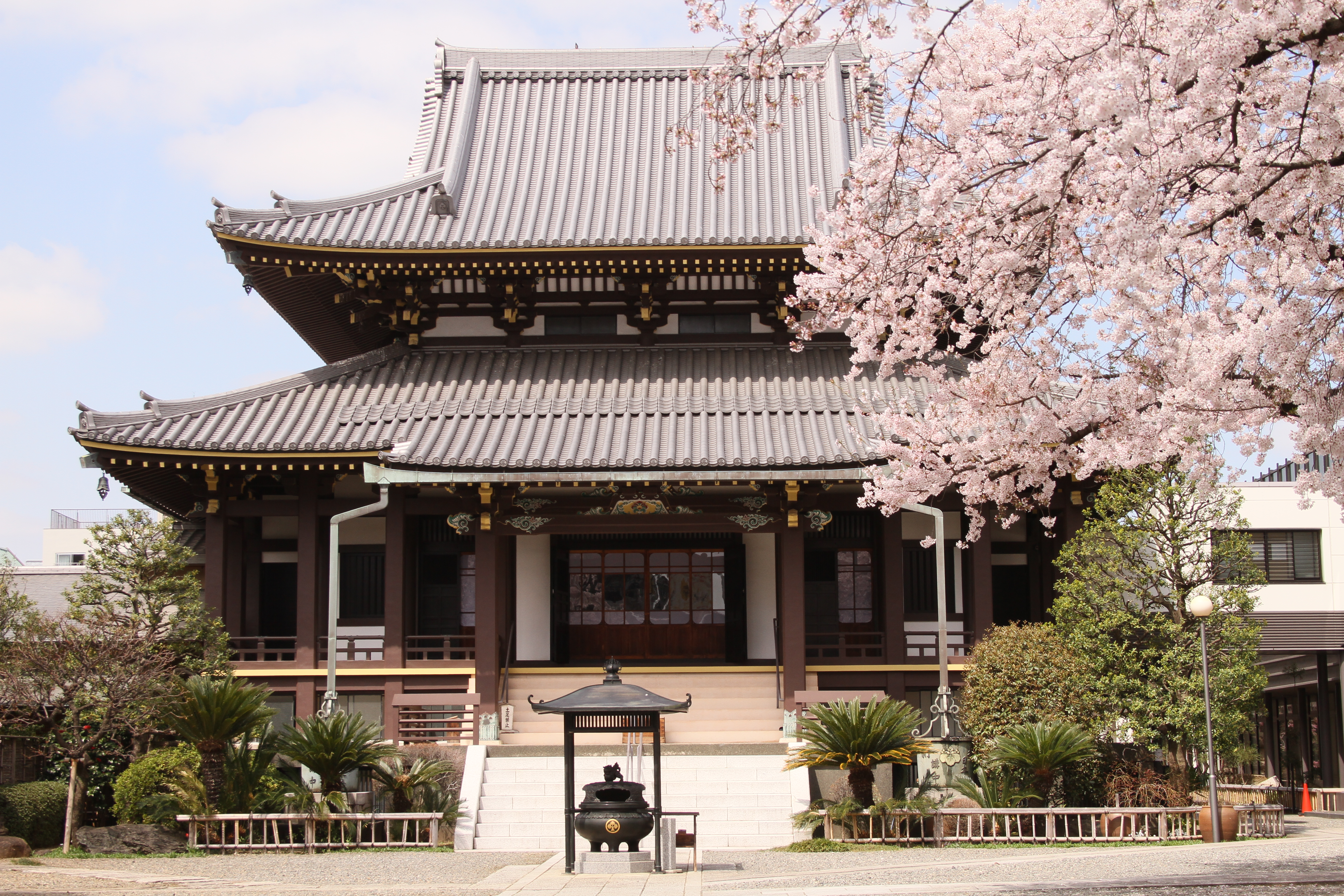 南命山善光寺（東京都港区）の本堂